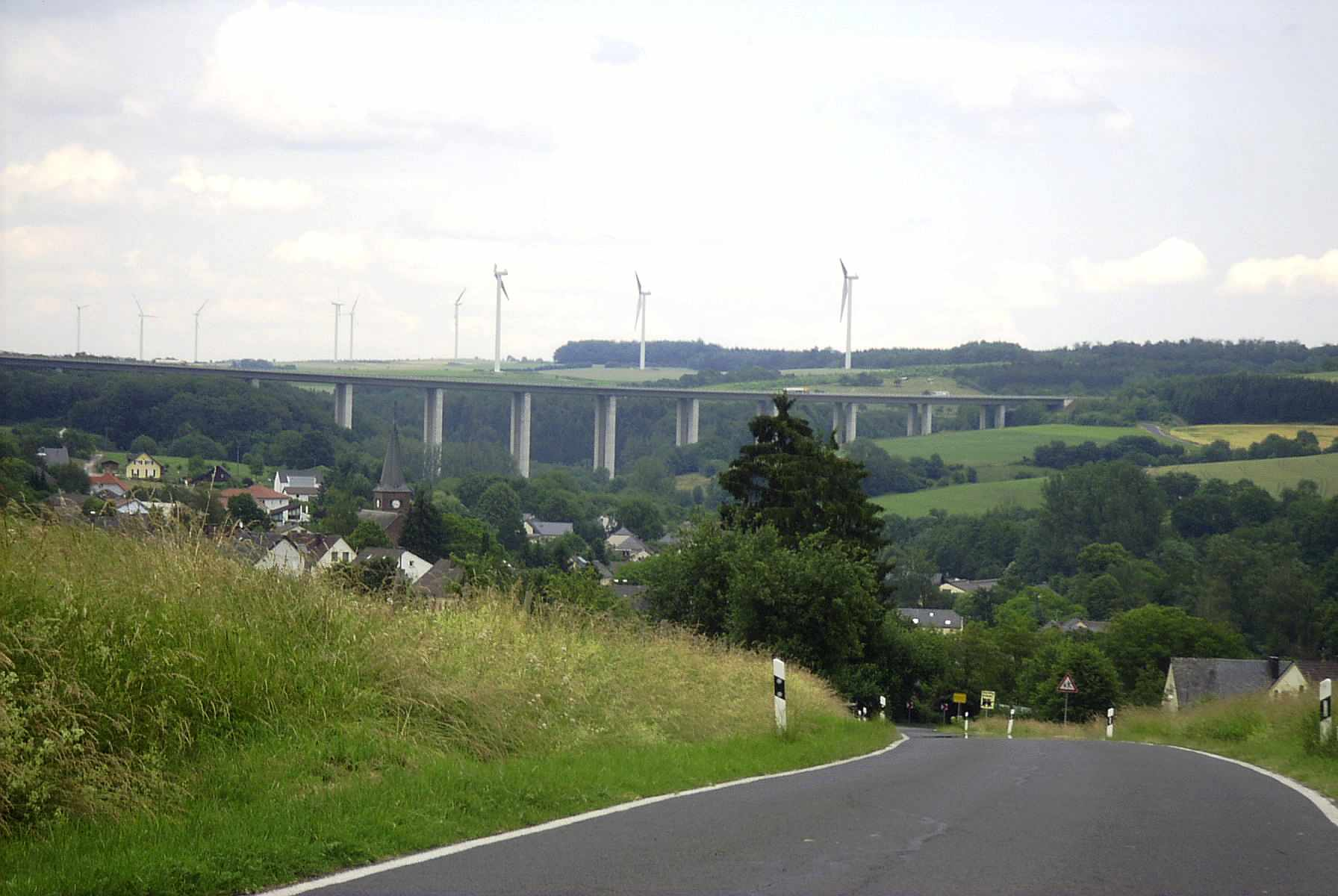 Bickendorf, im Hintergrund Autobahnbrücke der Bundesautobahn 60